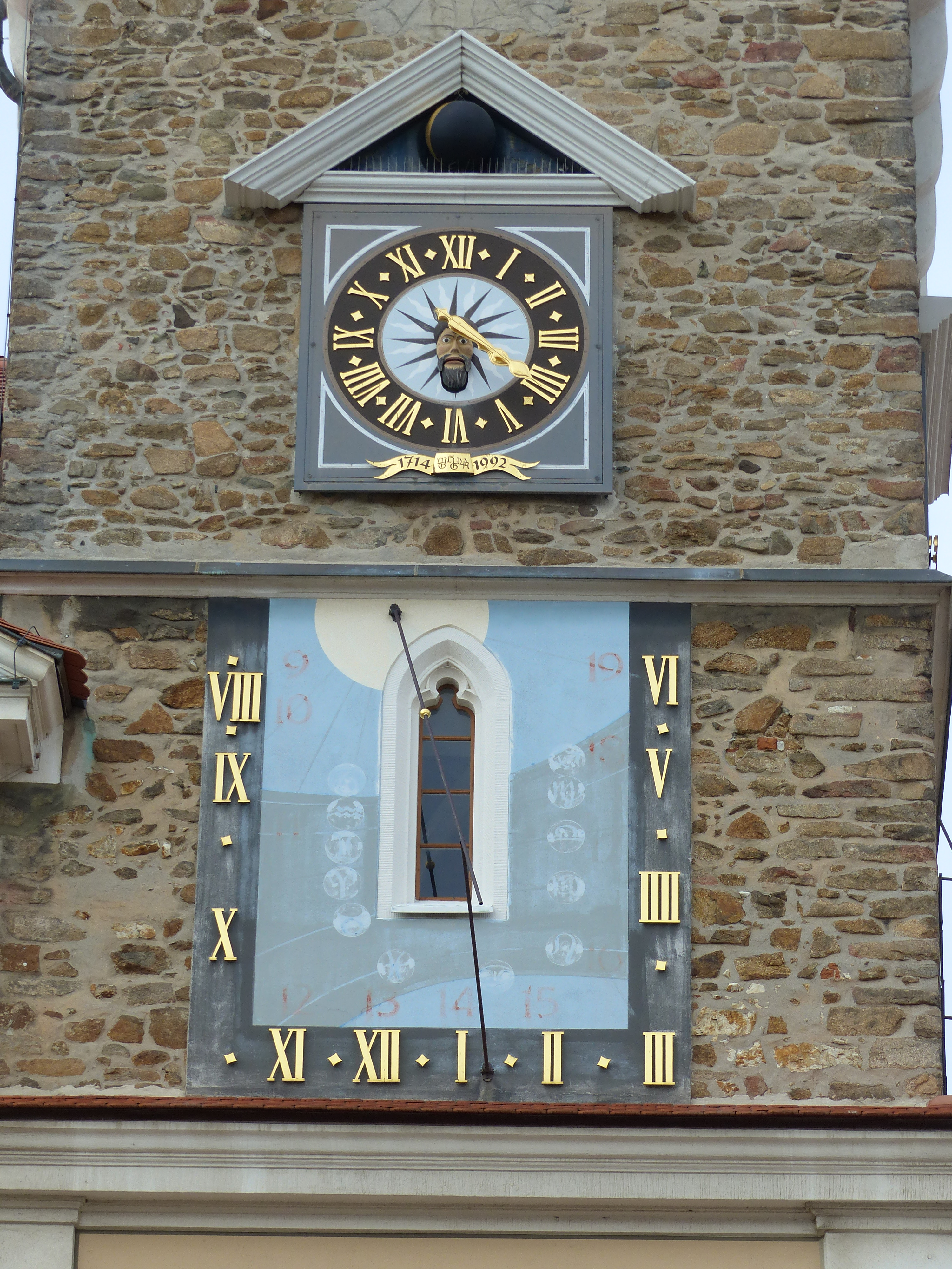 Rathaus Löbau, Sachsen